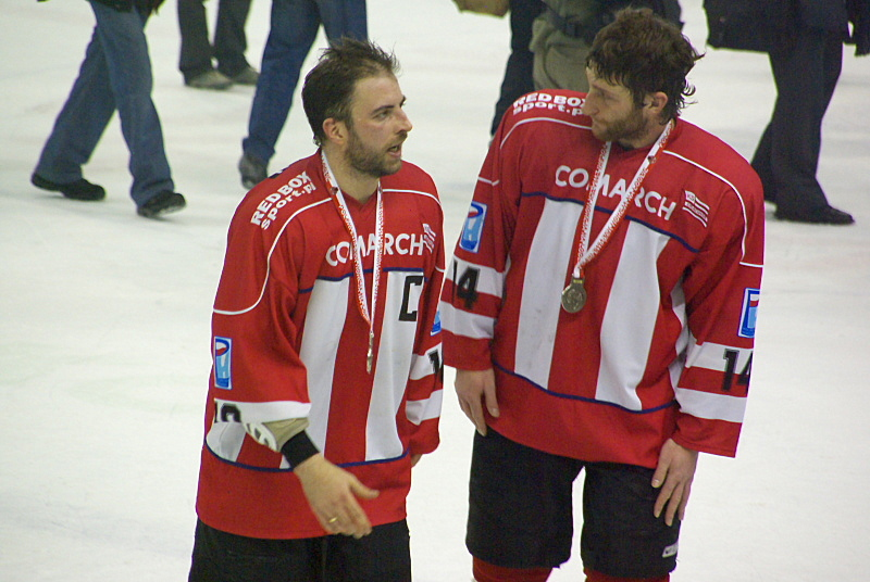 Piotr Sarnik i Łukasz Kulik w barwach ComArch Cracovii podczas piątego meczu finałowego o Mistrzostwo Polski 2011/2012 z Ciarko PBS Bank Sanok (Arena Sanok, 14 marca 2012)